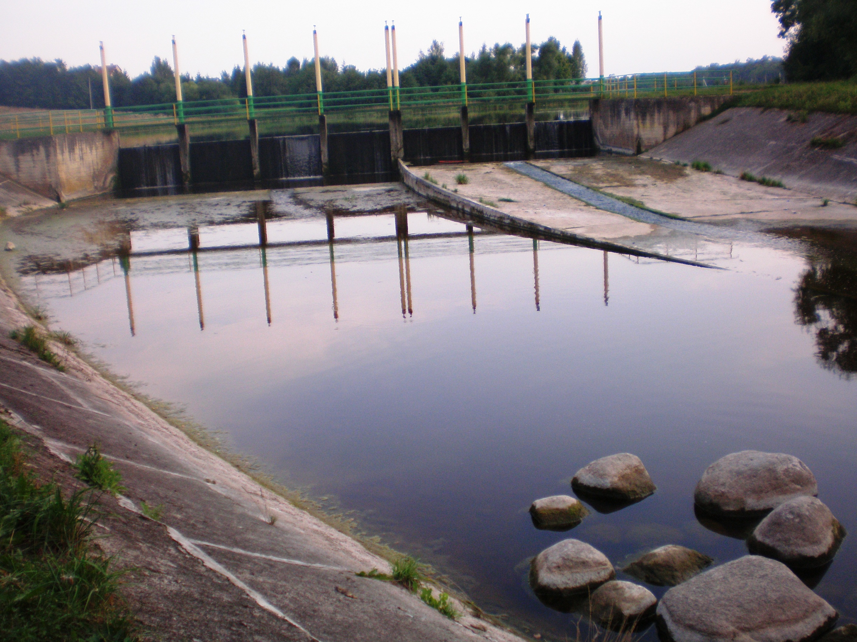 Barupe river, Lithuania, Labūnavos gyv. užtvanka